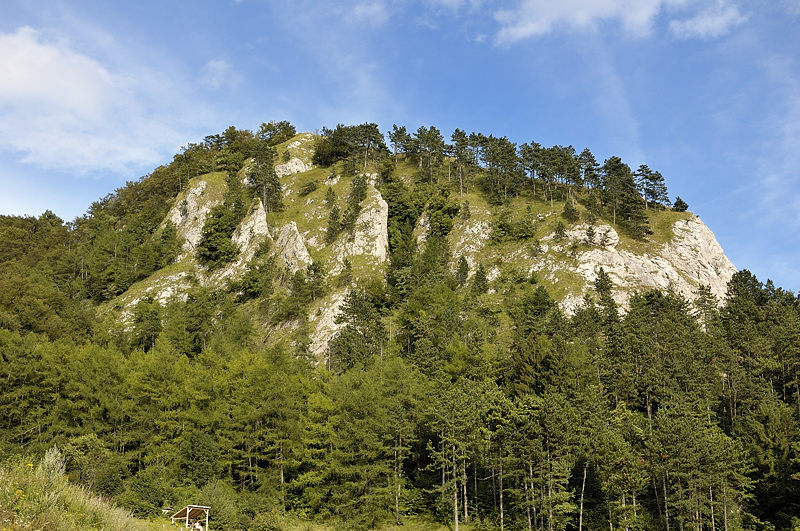 Vršatské bradlá